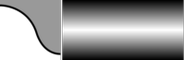 diagram of a cyma molding